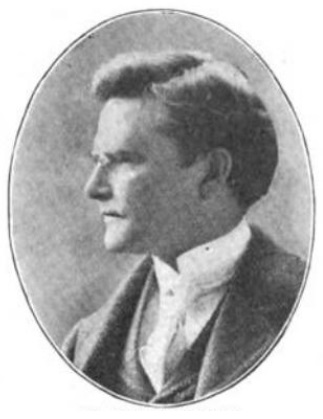 Cartoonist Louis Dalrymple